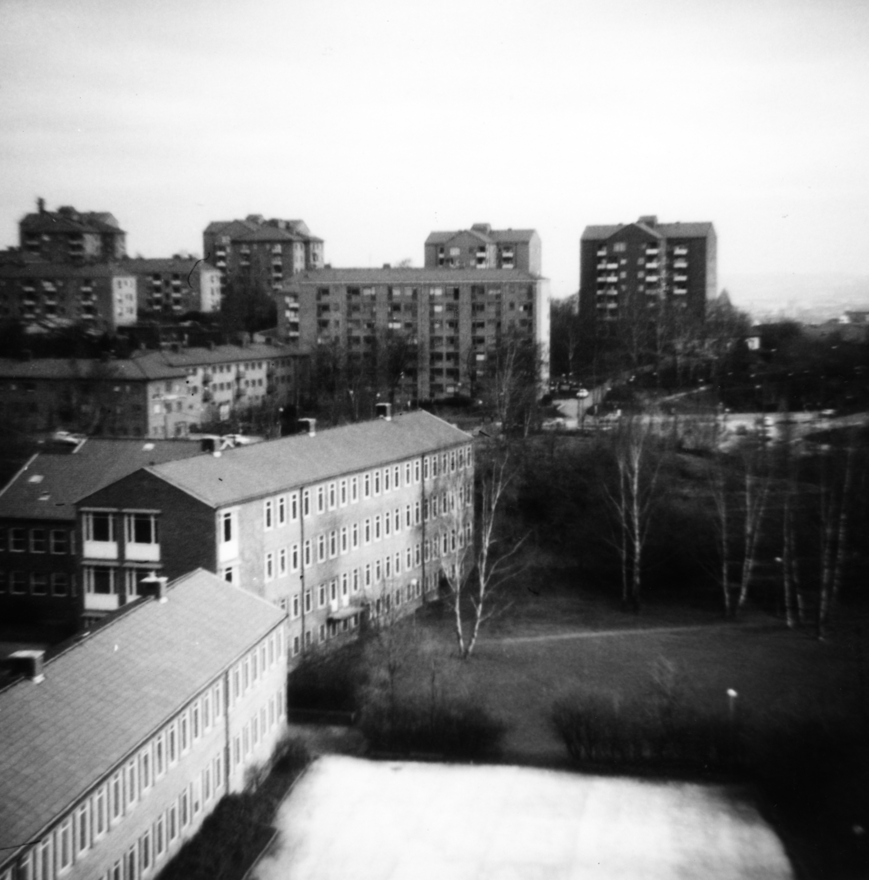 Folkskoleseminariet för Kvinnliga elever etc (vy söderifrån)